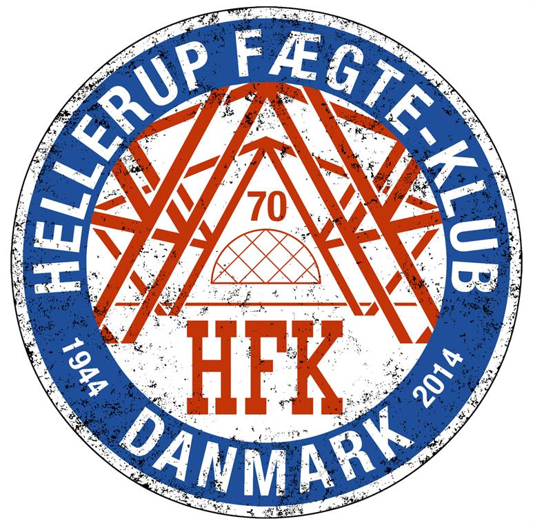 Logo af Hellerup Fægteklub